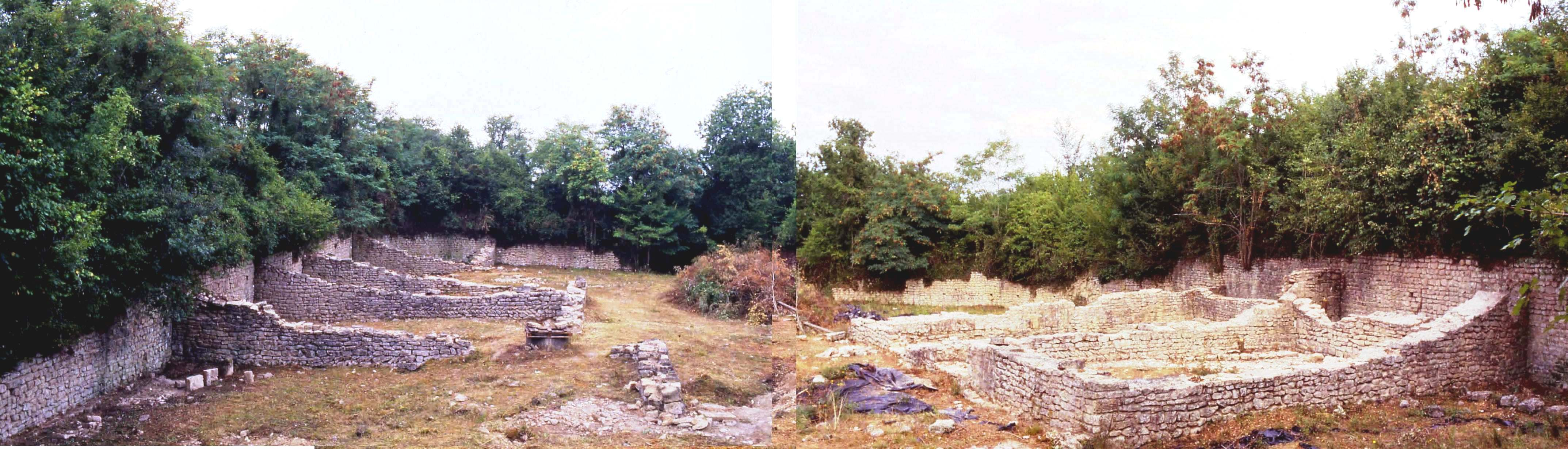 Vue générale du castrum d'Andone (Villejoubert, Charente) depuis l'est